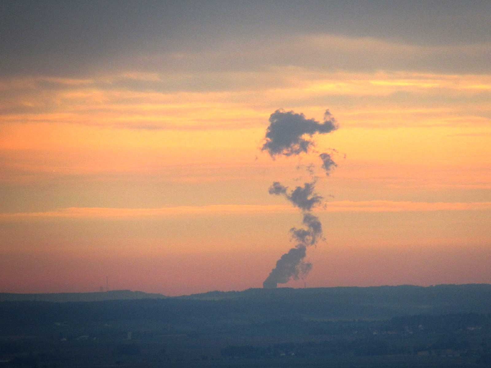 Kühlturmoberende und Wasserdampf Kernkraftwerk Isar, aus ca. 60 km Entfernung nordöstlich aufgenommen